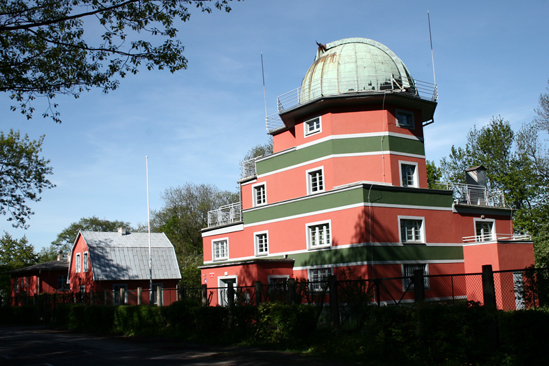 Obserwatorium Astronomiczne we Wroclawiu